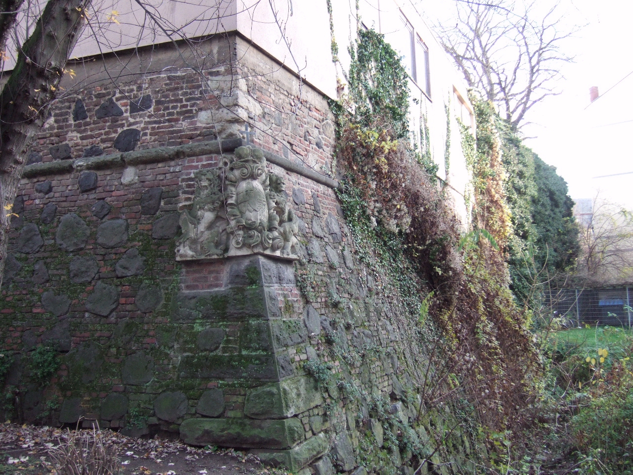 Erhaltener Teil der barocken Stadtbefestigung am Florentiusgraben – Bastion Heinrich – in Bonn